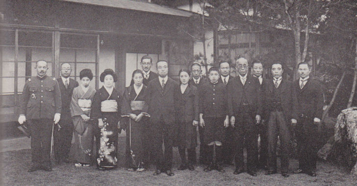 尾形藤吉（右2番目）と東久邇宮稔彦王（最前列中央）